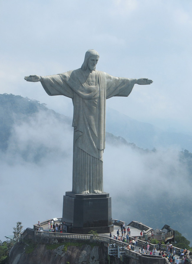 Cristo Redentor do Rio de Janeiro